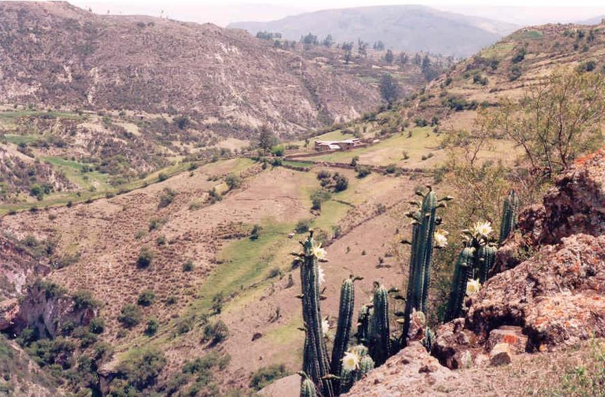 Vue du domaine de Pitunilla (Parinacochas, Ayacucho, Pérou)